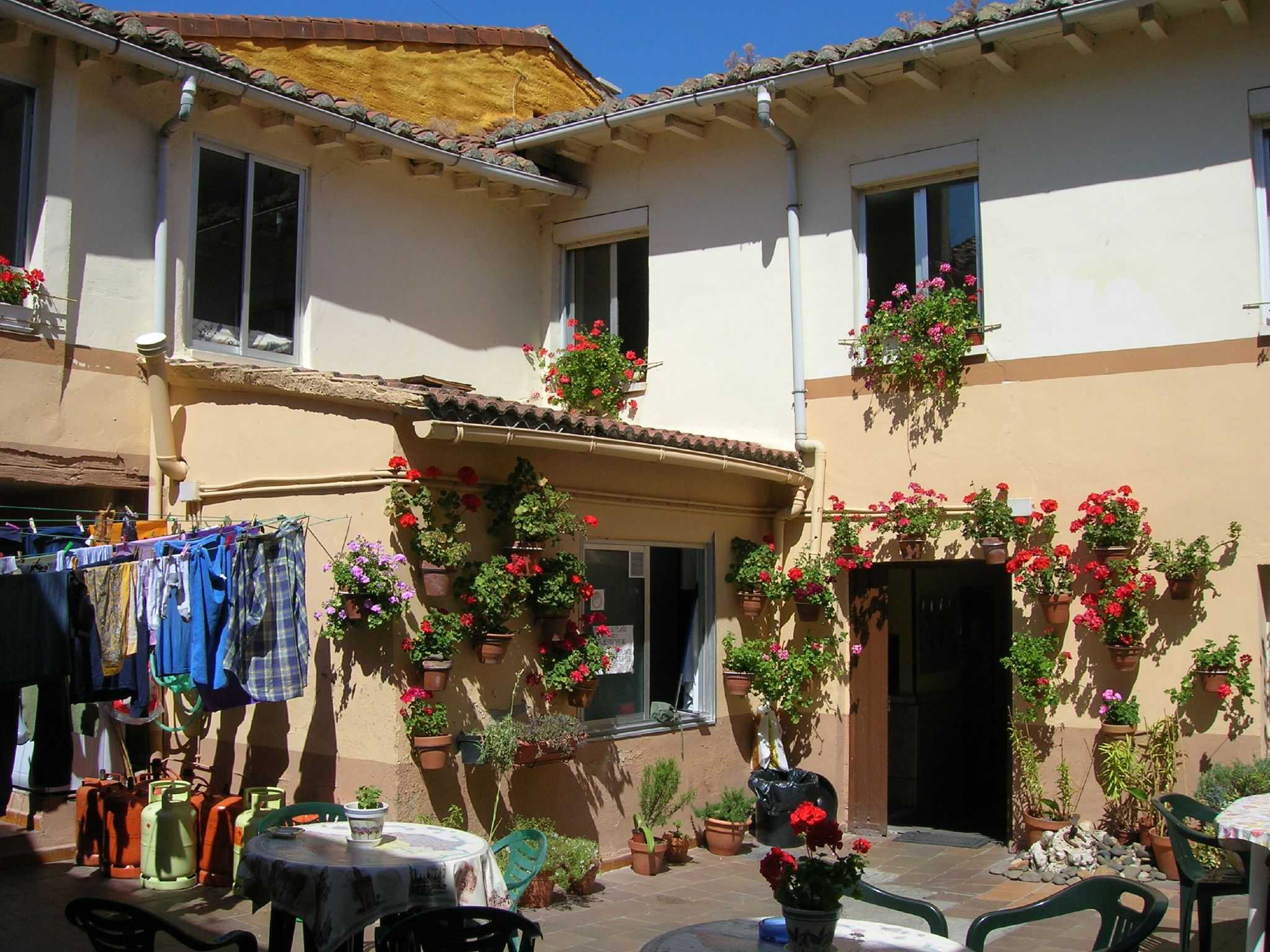 El albergue de peregrinos de Mansilla de las Mulas es atendido desde hace 9 años por Laura Barredo. Quienes la han conocido, la recordarán por mucho tiempo por su simpatía y hospitalidad.